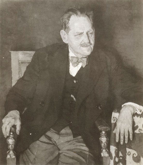 Heinrich Hönich - malíř, grafik, profesor AVU